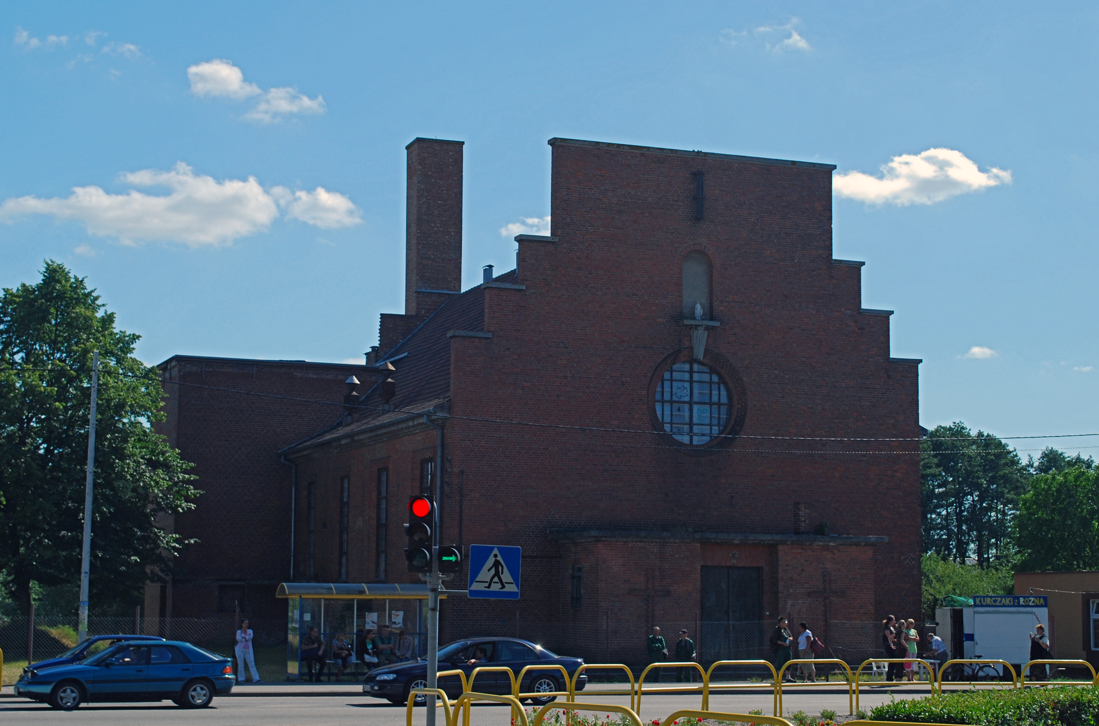 Die ehemals evangelische Kreuzkirche in Hohenstein (Pszczółki). Die KReuzkirche wurde im Oktober 1931 durch Generalsuperintendent Paul Kalweit eingeweiht.